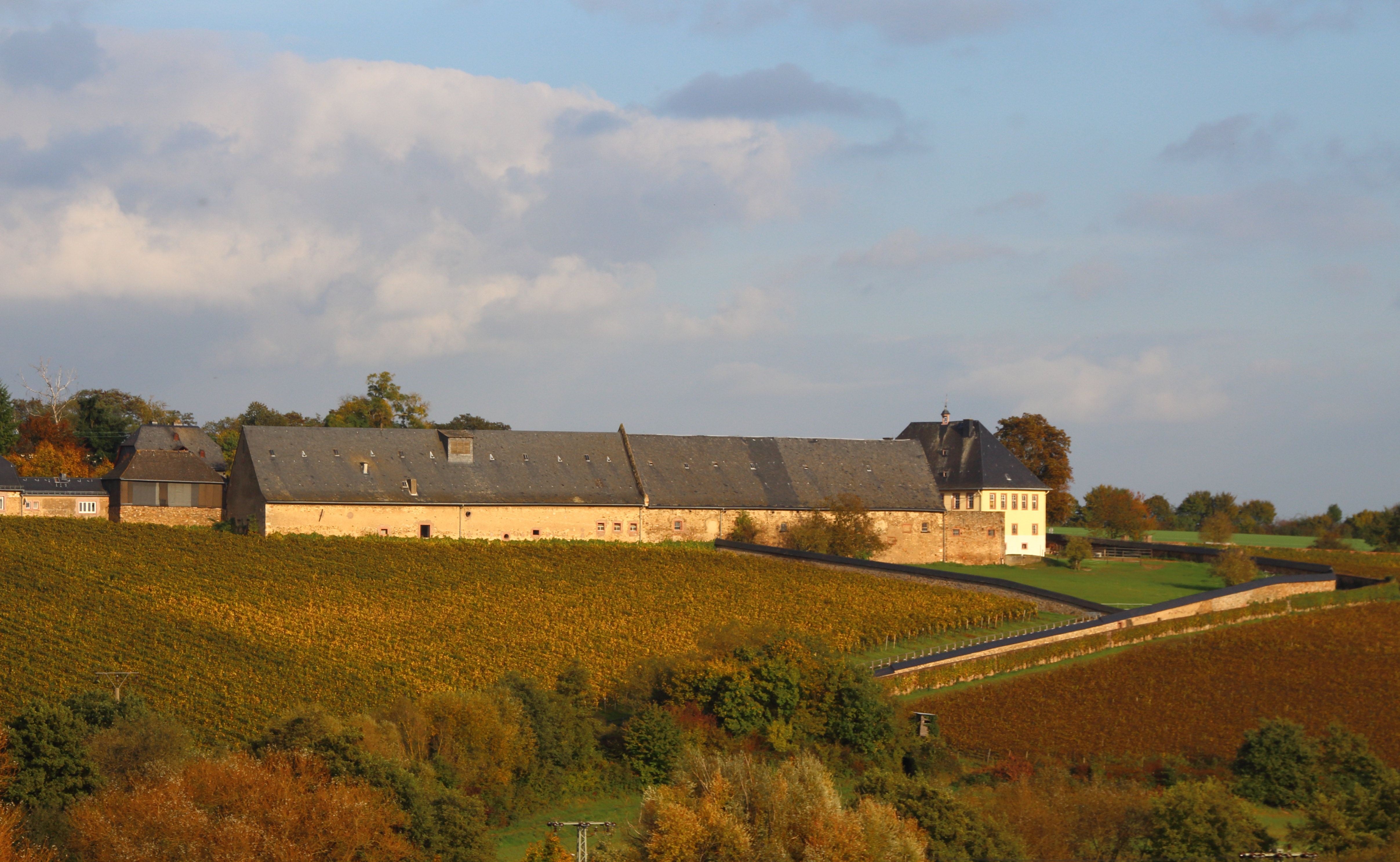 Domäne Neuhof, Grangie des Klosters Eberbach, gegründet zwischen 1163 und 1178. Hattenheim im Rheingau.